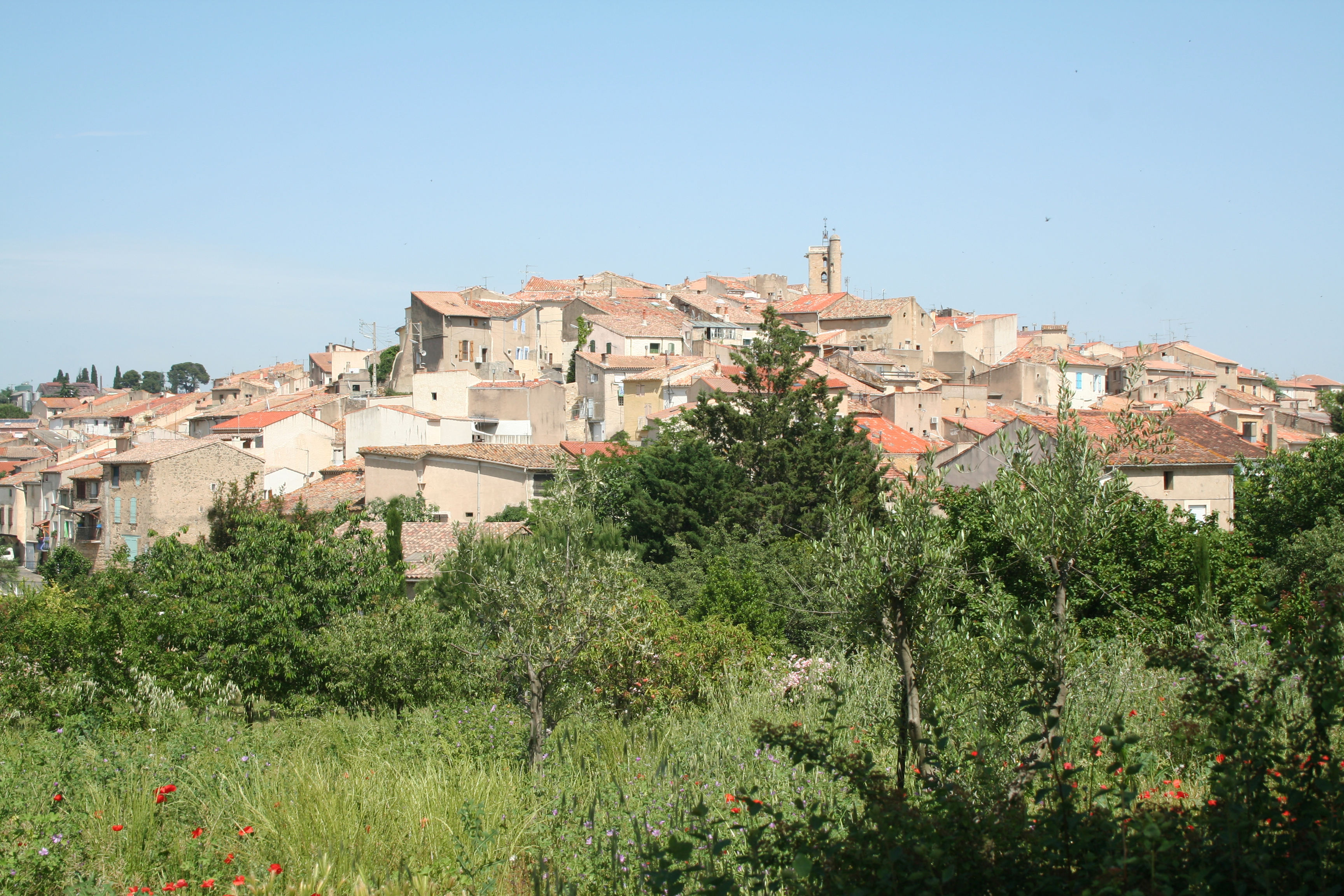 Servian (Hérault) - vue générale.